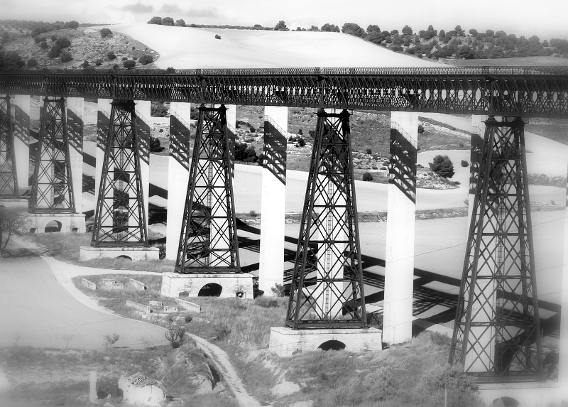 Viaducto del Hacho. Noviembre de 2010